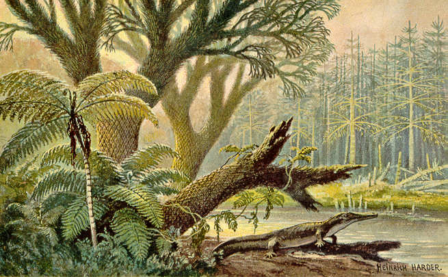 Archegosaurus